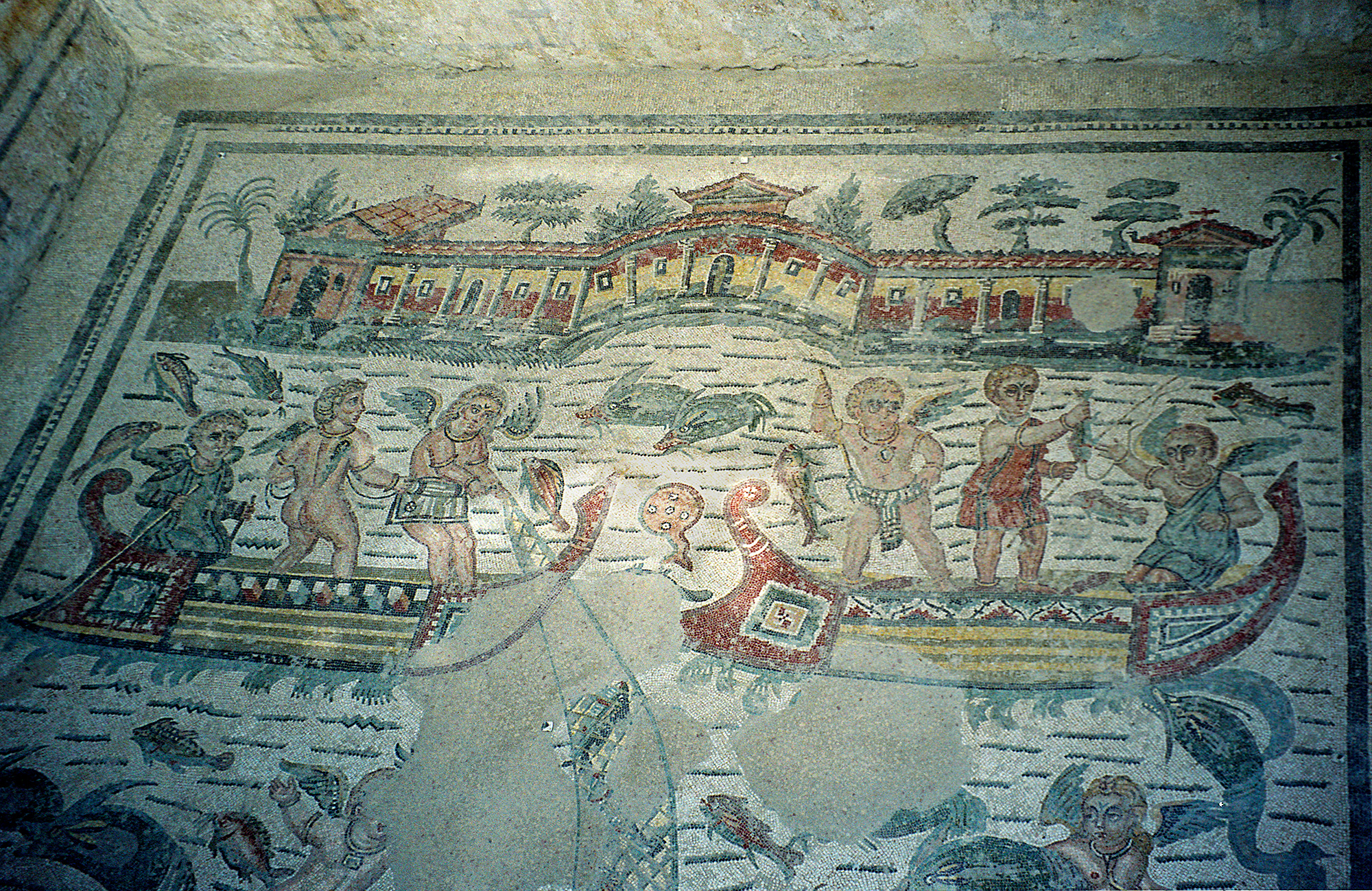 Sicily, Villa Romana del Casale